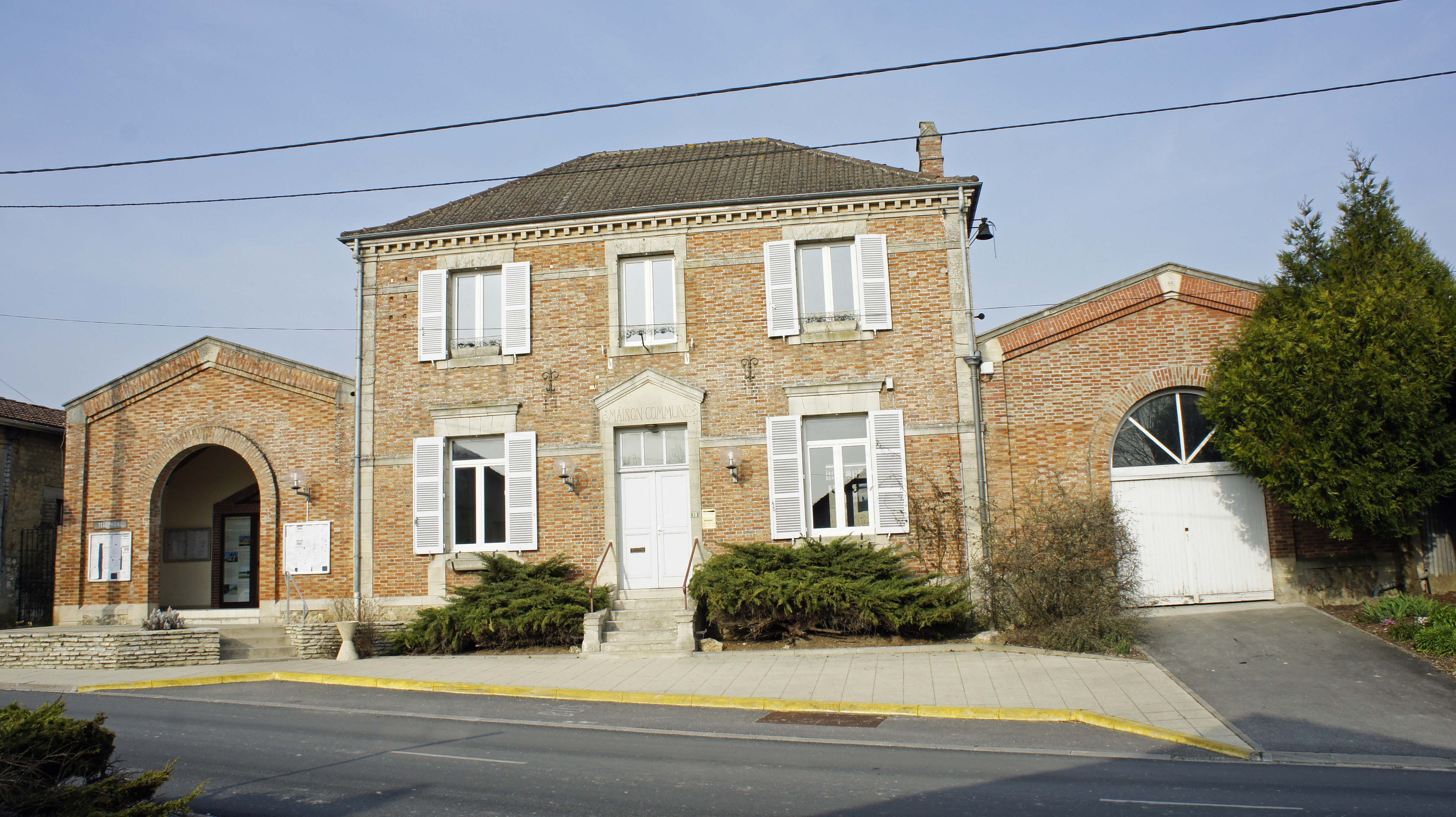 Vue de la mairie de Moncetz-Longevas (Marne, France).